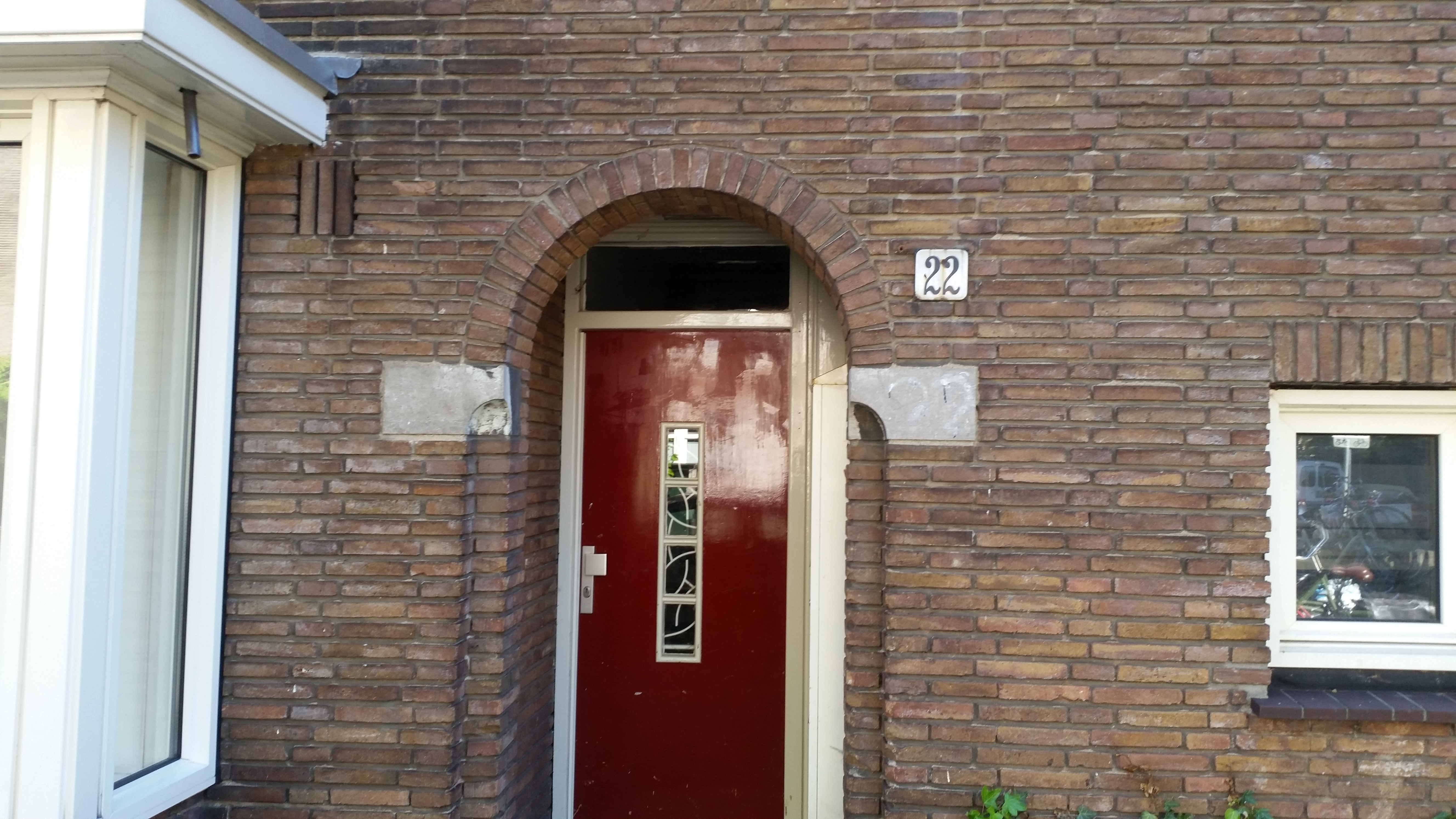 Sanderijnstraat, deur huisnummer 22 te Amsterdam-West